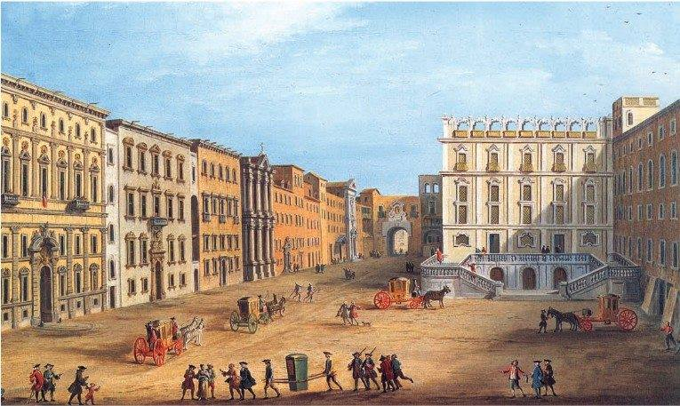 Napoli - L'odierna Piazza Bellini e in fondo, la distrutta Porta di Costantinopoli. Dipinto del XVIII secolo. Autore sconosciuto.